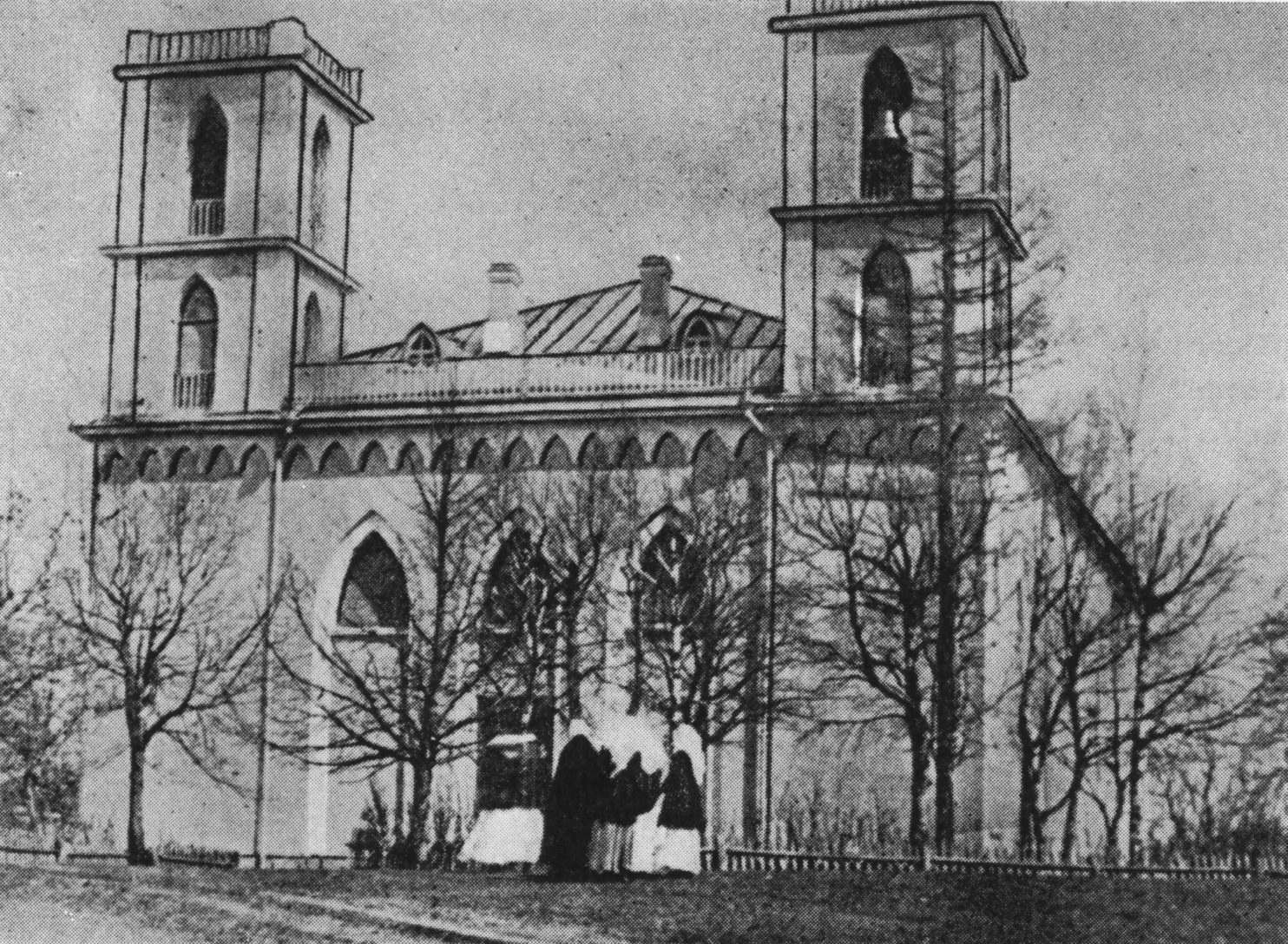 Кирха лютеранского прихода Туутари.